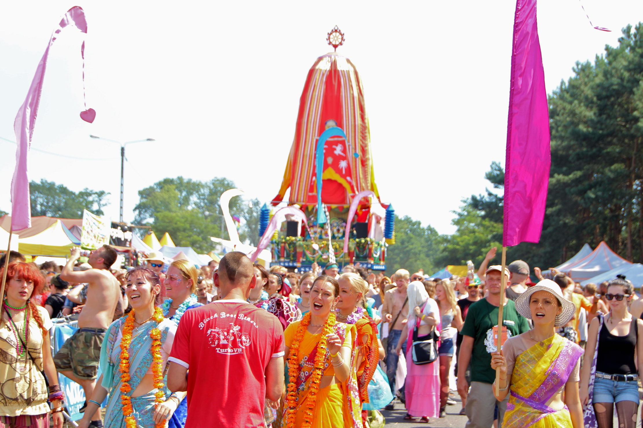 Przystanek Woodstock w 2012 r.